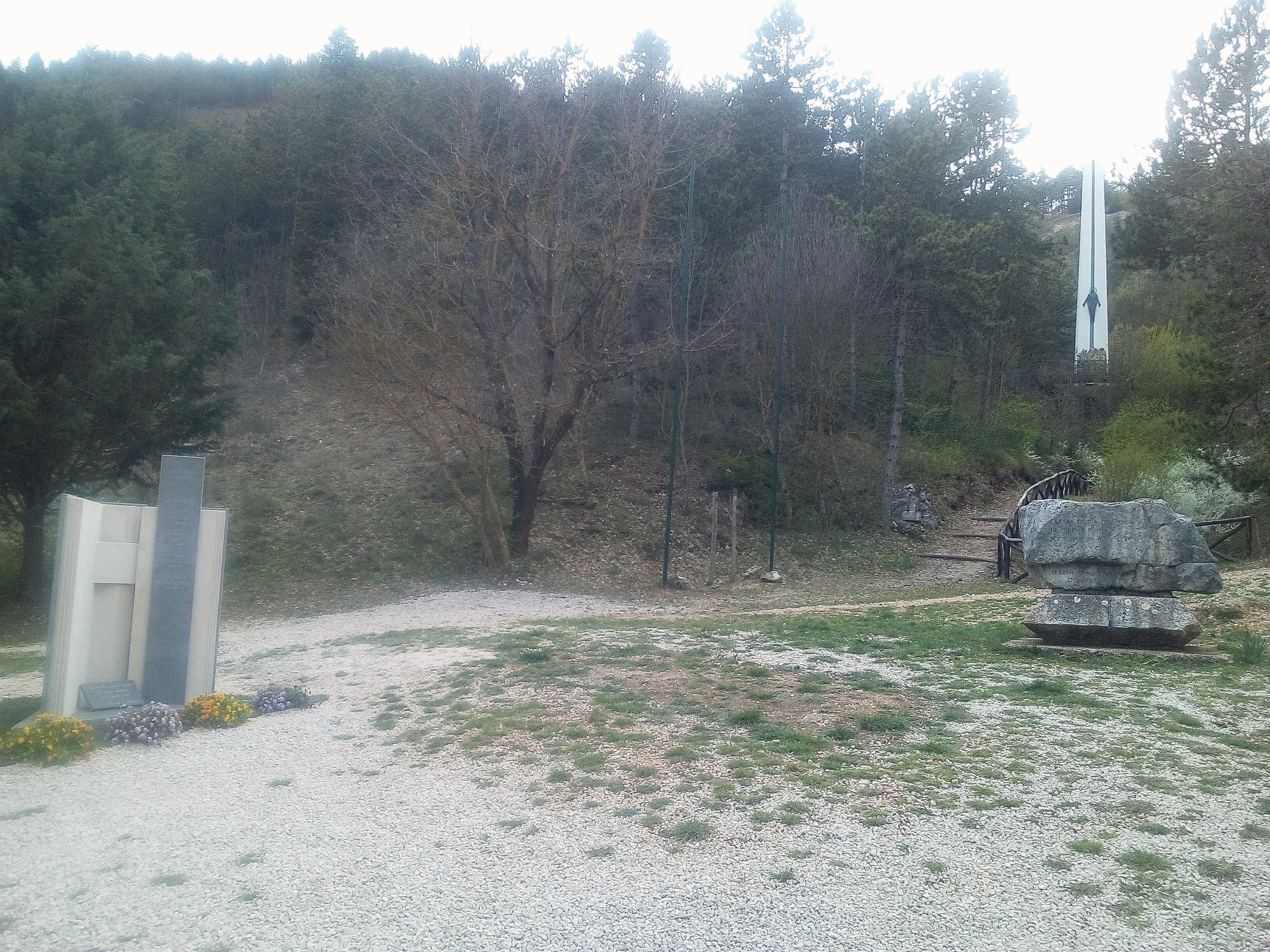 Memoriale del monte Salviano